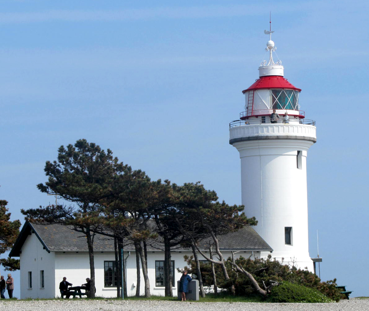 Sletterhage Fyr på den sydøstlige del af Helgenæs, Mols, Jylland Denmark